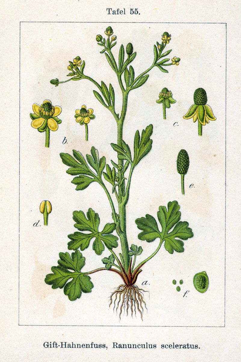 Ranunculus sceleratus L. Original Description Gift-Hahnenfuss, Ranunculus sceleratus